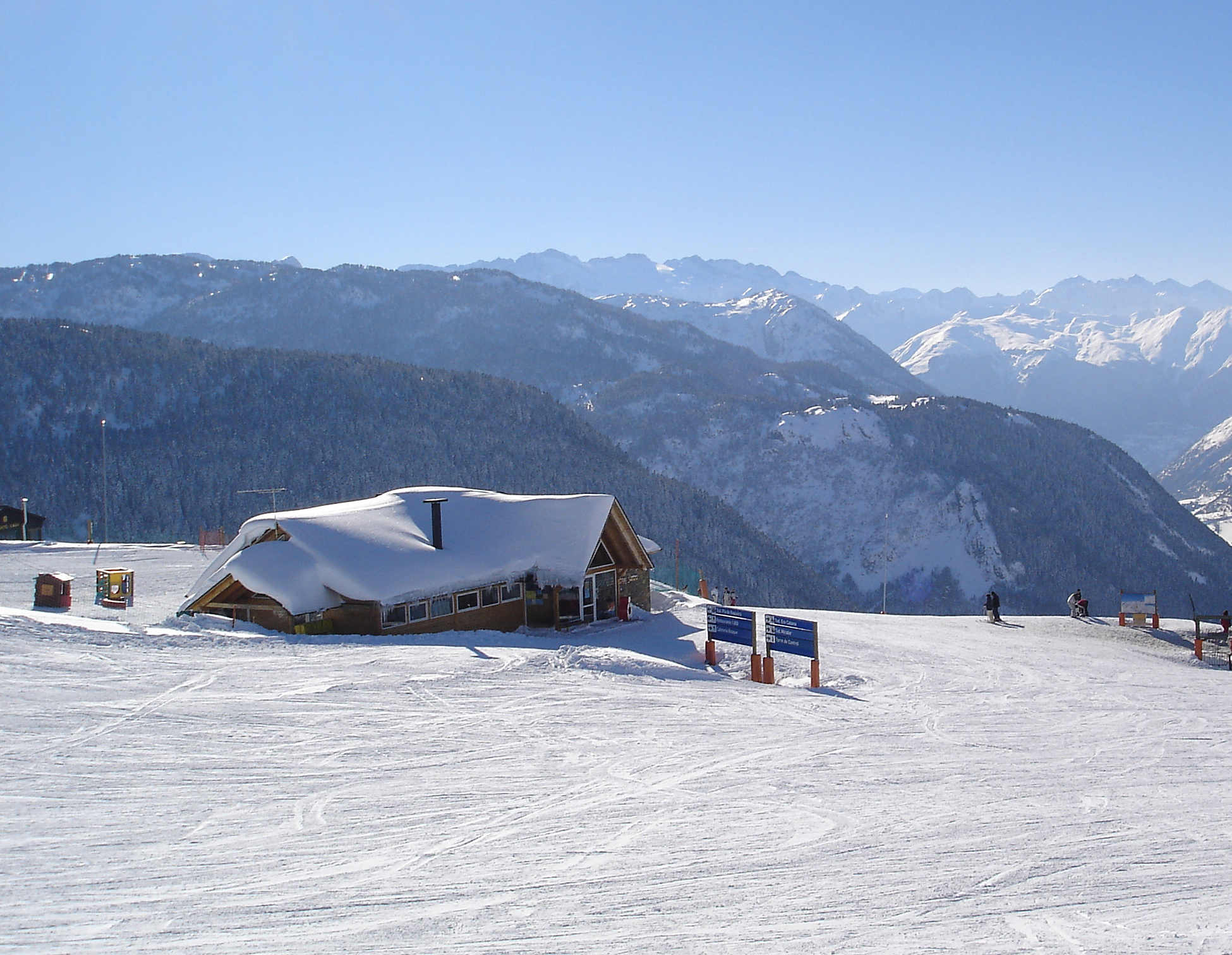 Vista del Valle de Arán desde Baqueira.